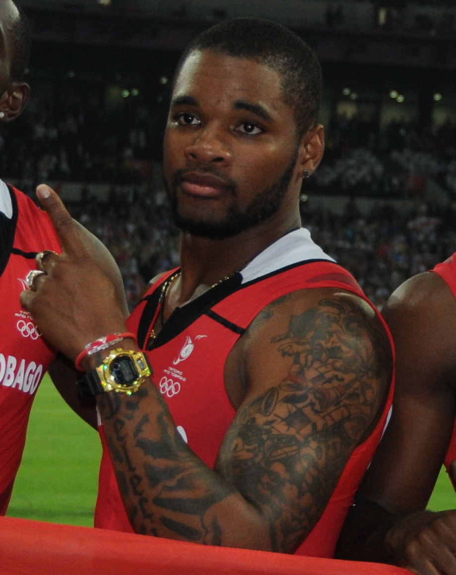 Equipe du relais 4x100 de Trinité-Tobago